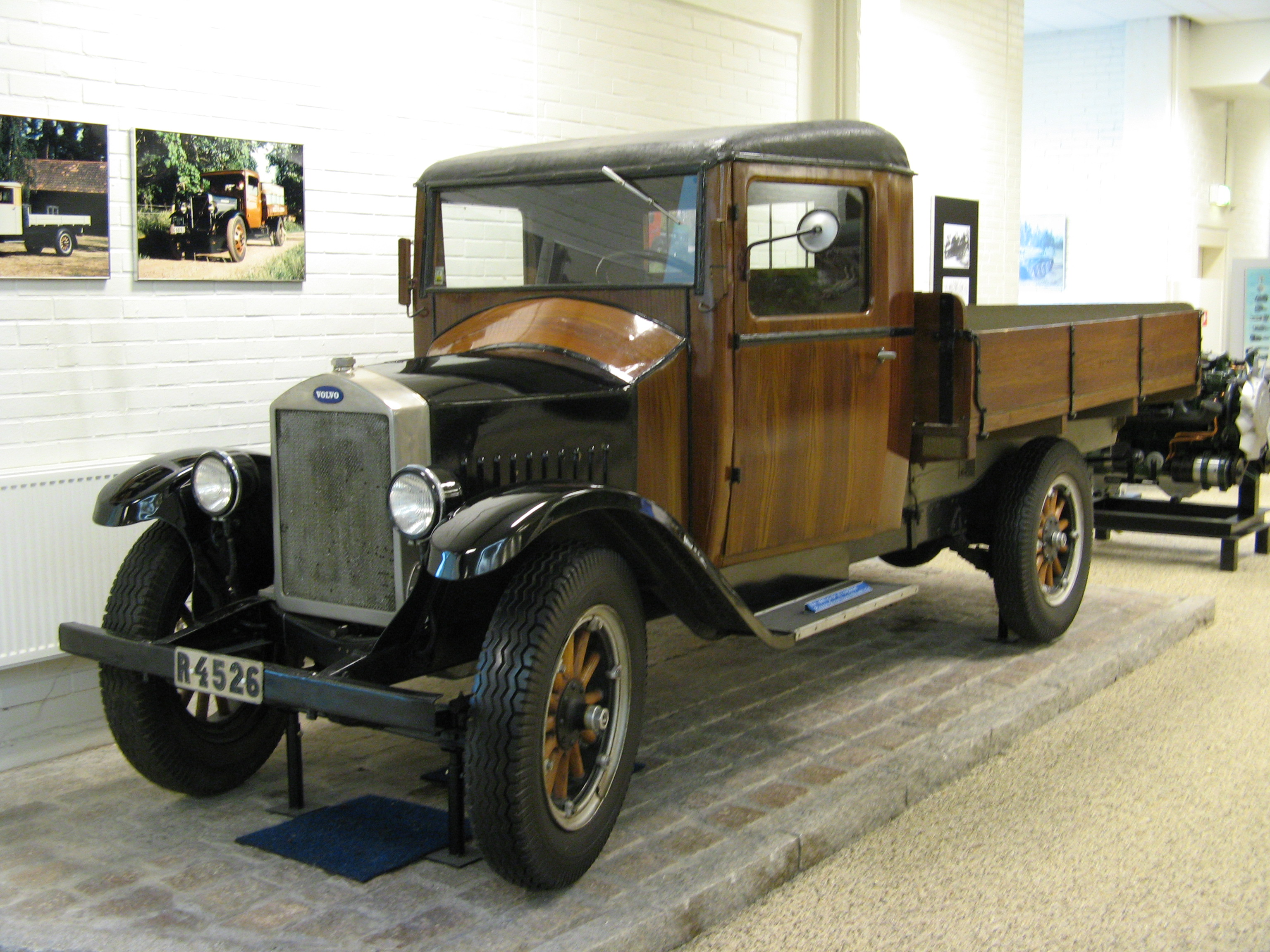 Volvo LV 40 (1928)